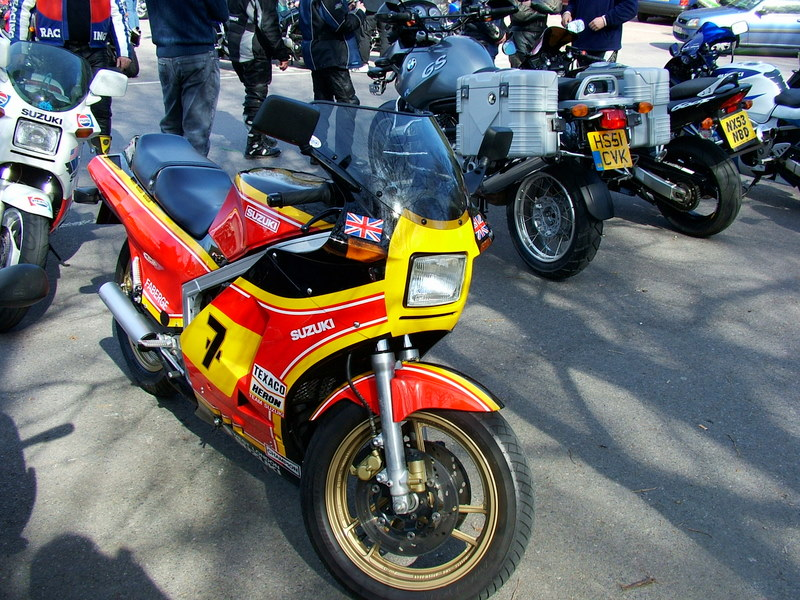 Suzuki RG500 2st four